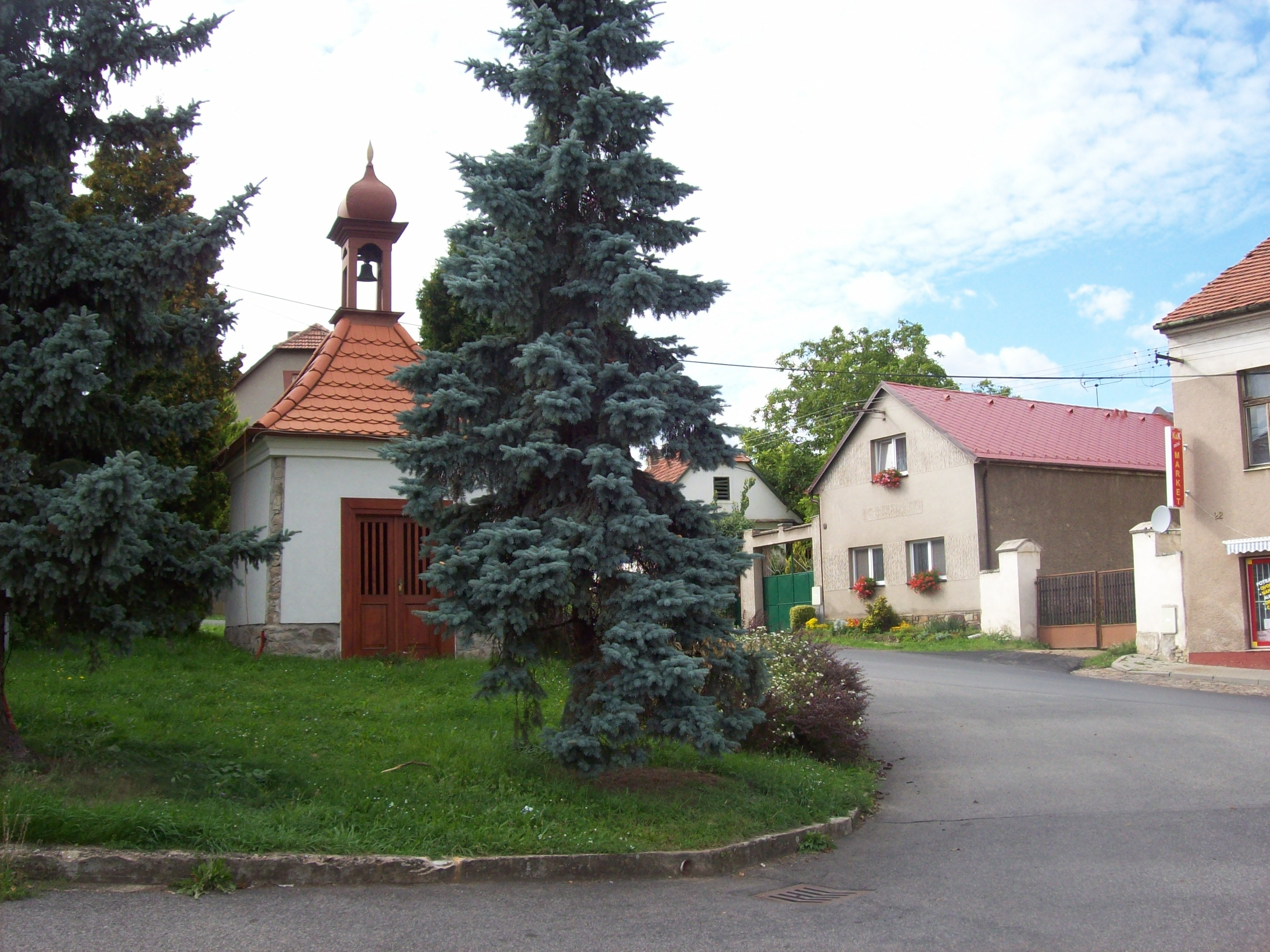 Osek - náves